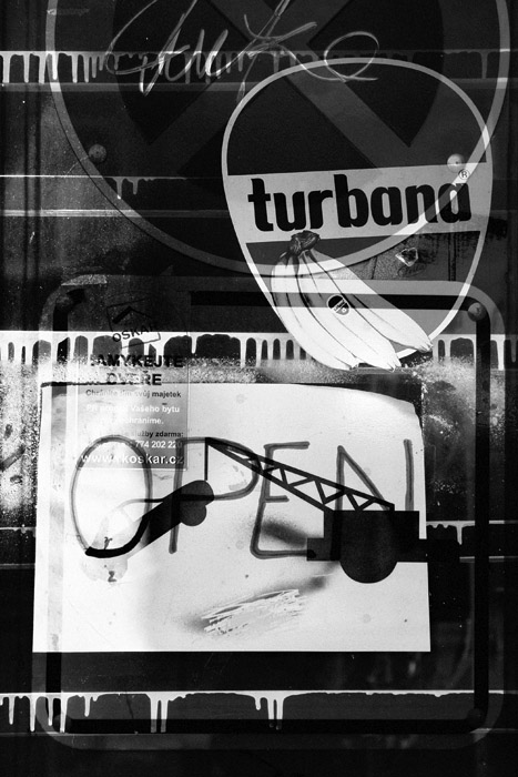 druk cyfrowy, 2008